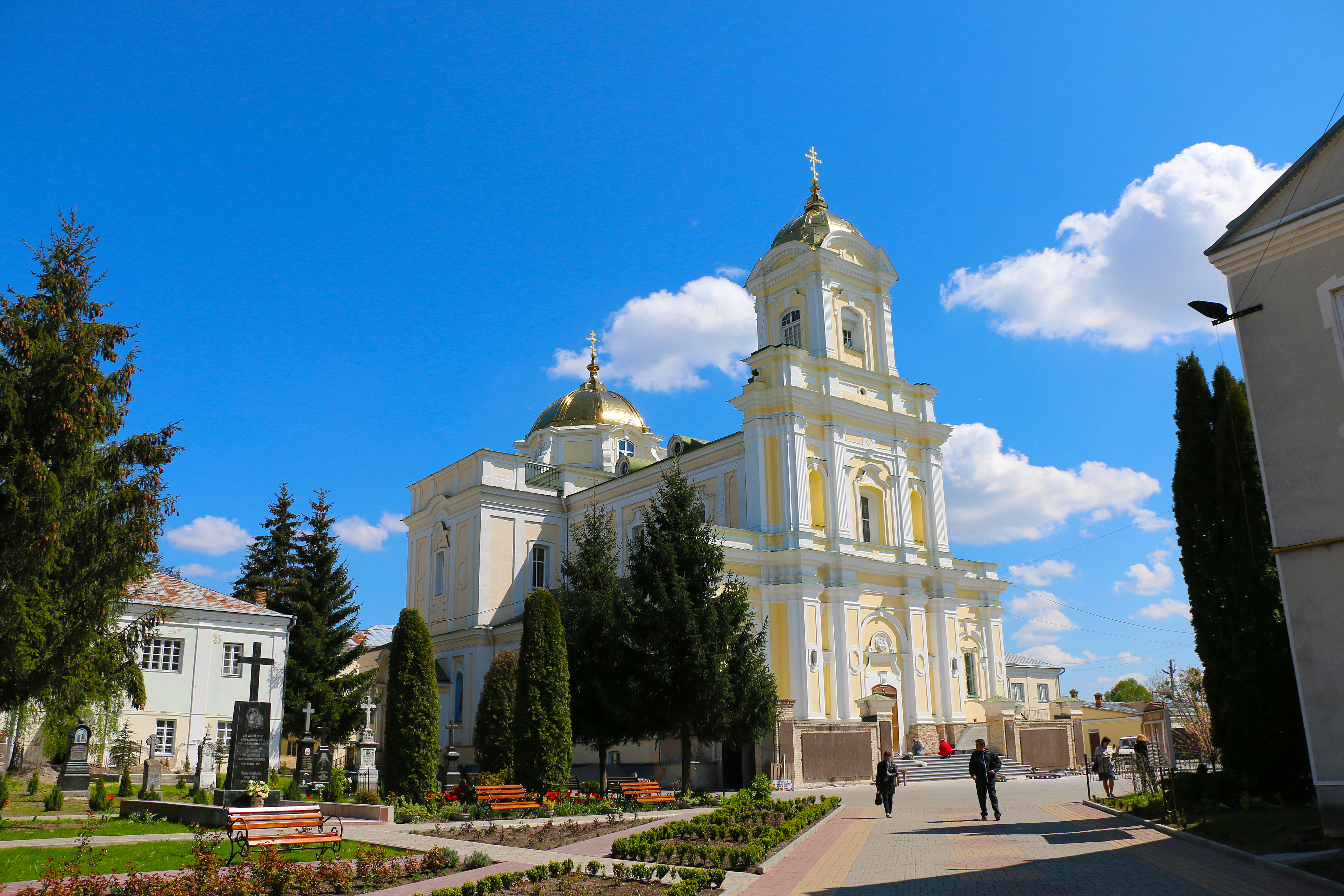 Монастир бернардинів (мур.), арх. П.Гижицький, Луцьк, вул. Л. Українки, 60